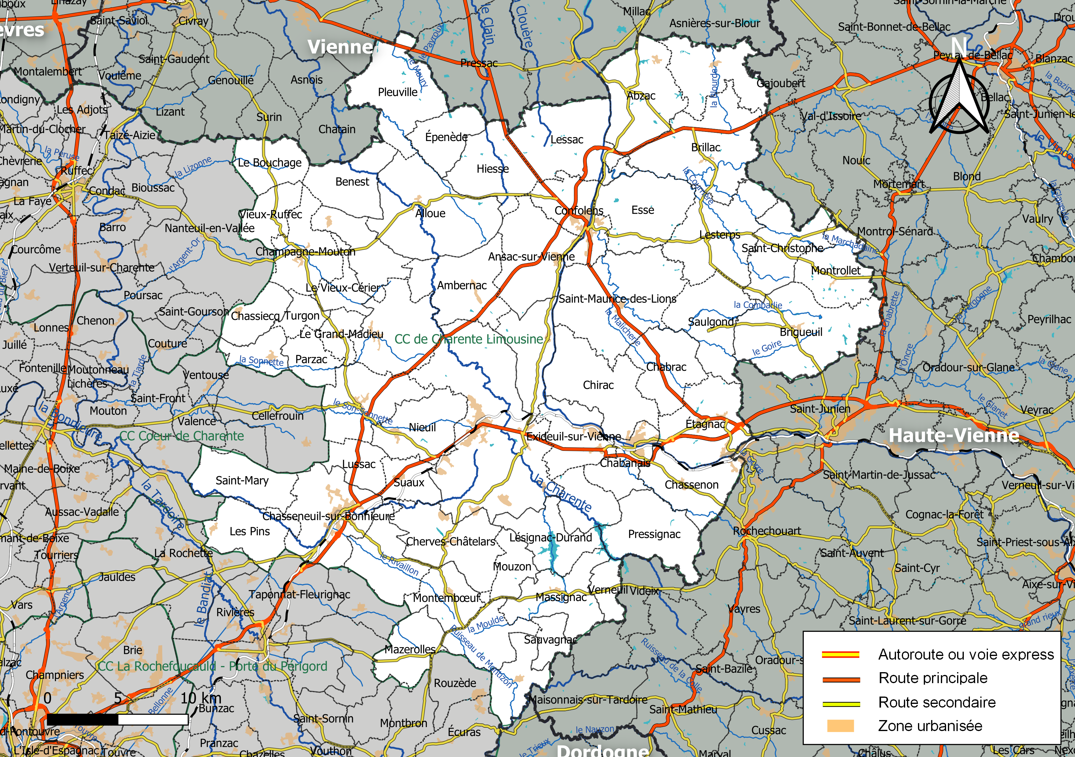 Carte géographique de la Communauté de communes de Charente Limousine, département de la Charente, France. Composition au 1er janvier 2019.